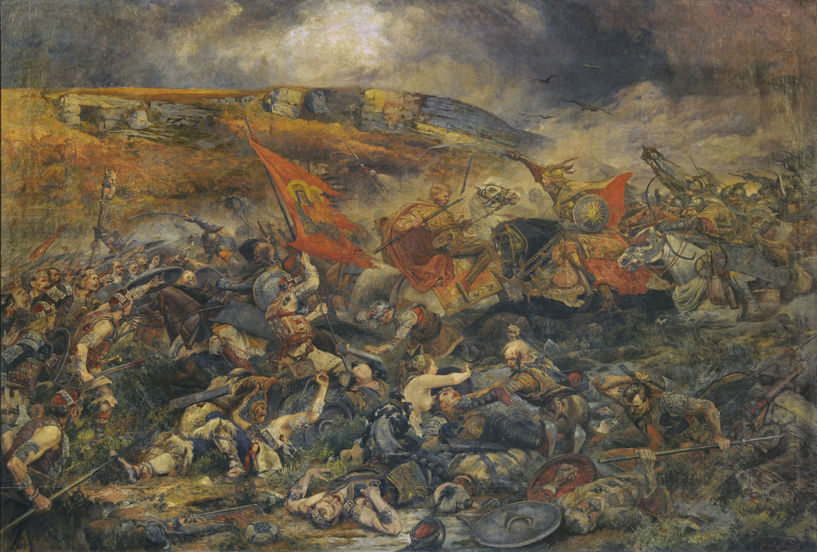 Feszty Árpád- A bánhidai csata